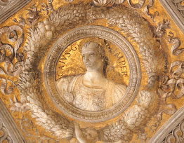 detail: Emperor Caligola